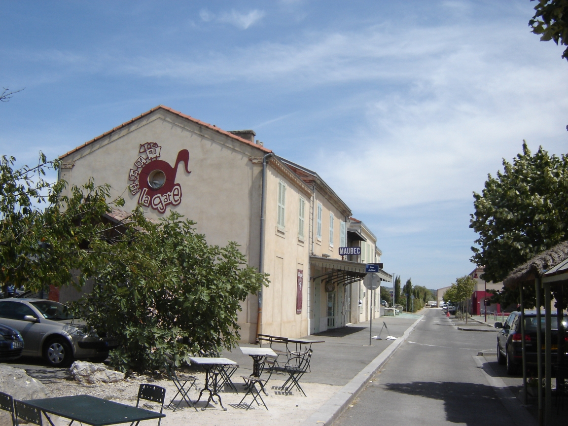 Gare de Maubec, Vaucluse, France